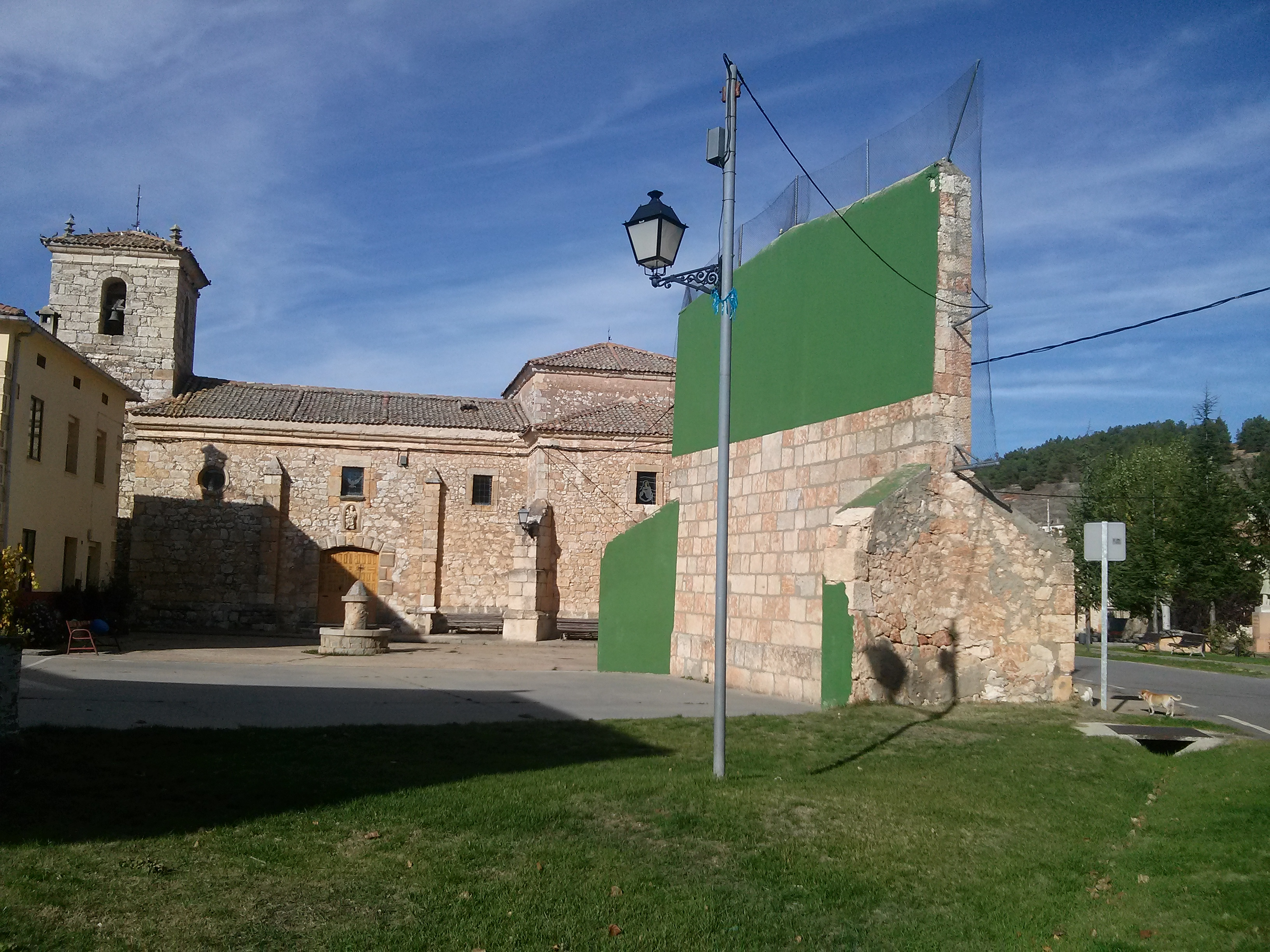 Vista de Iglesia y Frontón.